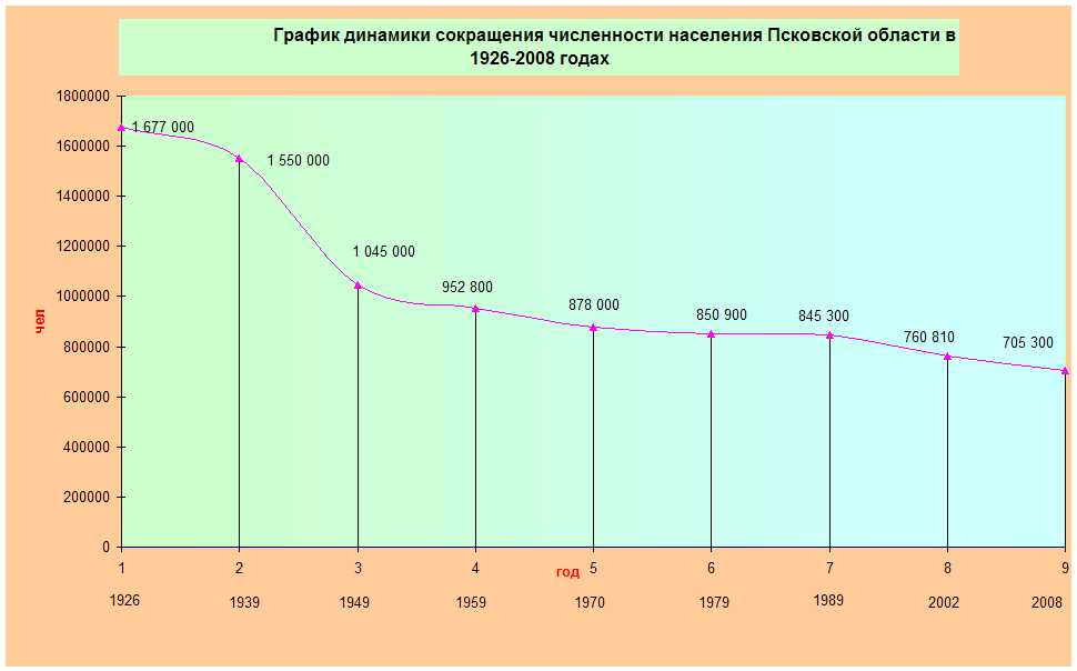 Динамика сокращения численности населения Псковской области в 1926 - 2008 гг. (в её современных границах).